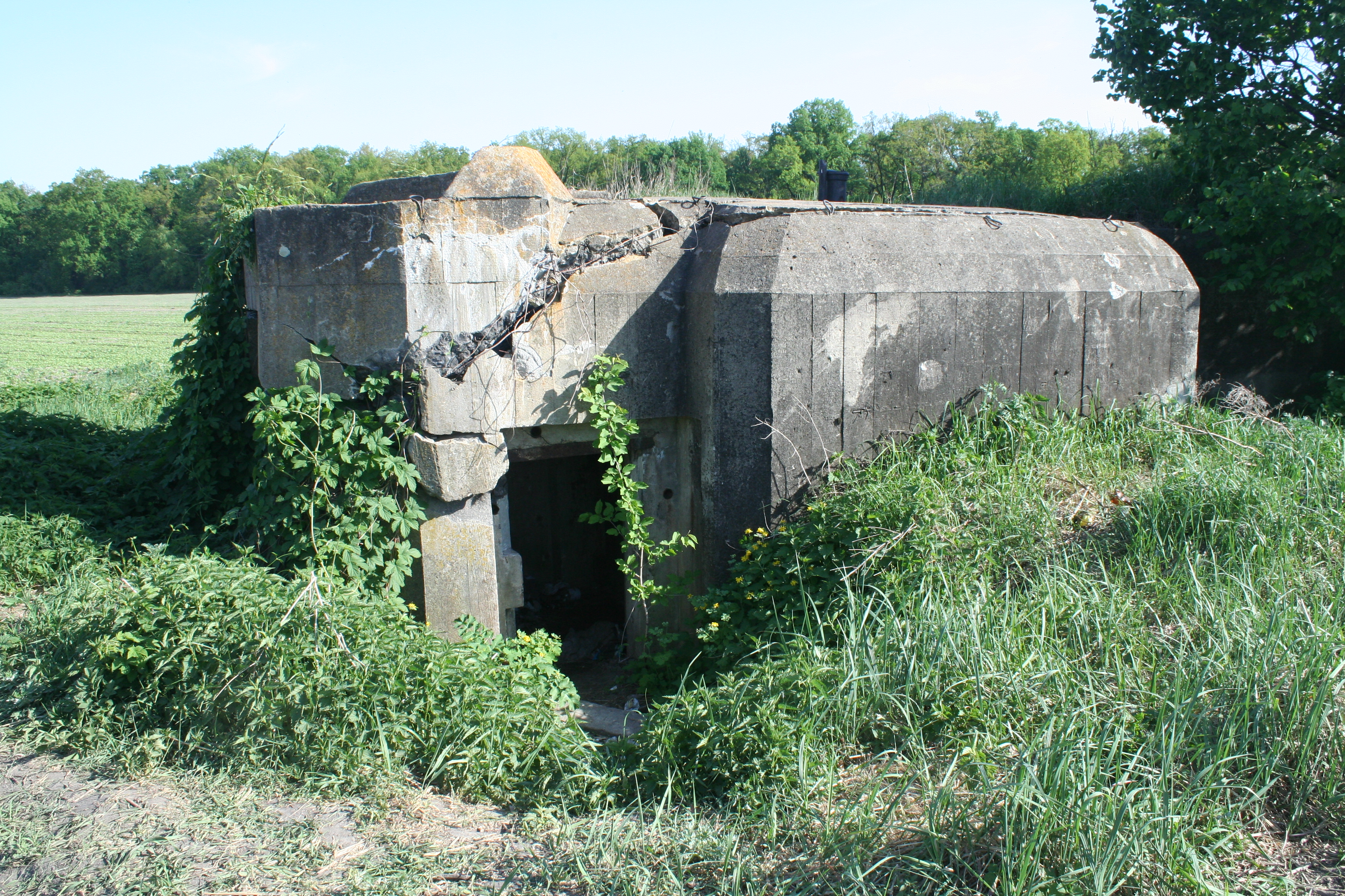 Київська область, смт Чабани, ДОТ 182, зовнішній вигляд з боку входу. Однорівнева споруда з двома амбразурами для кулеметів, частково укрита земляним валом, який підкріплений залізобетонною стінкою. Конструкція ззовні виглядає майже цілою, але має ушкодження у вигляді кількох довгих тріщин на всю глибину бетону. добре видно над вхідною групою.